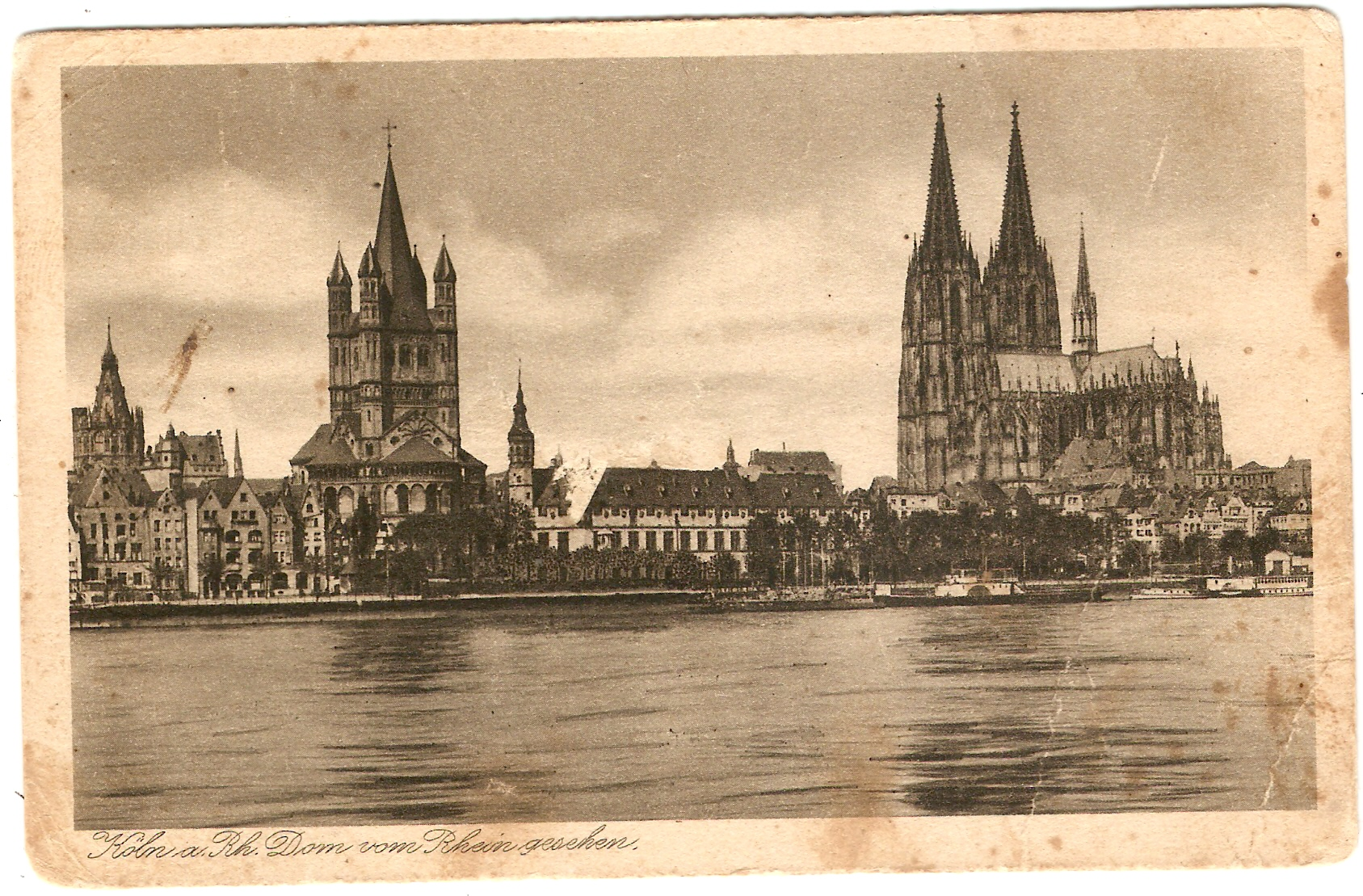 Кельнський собор